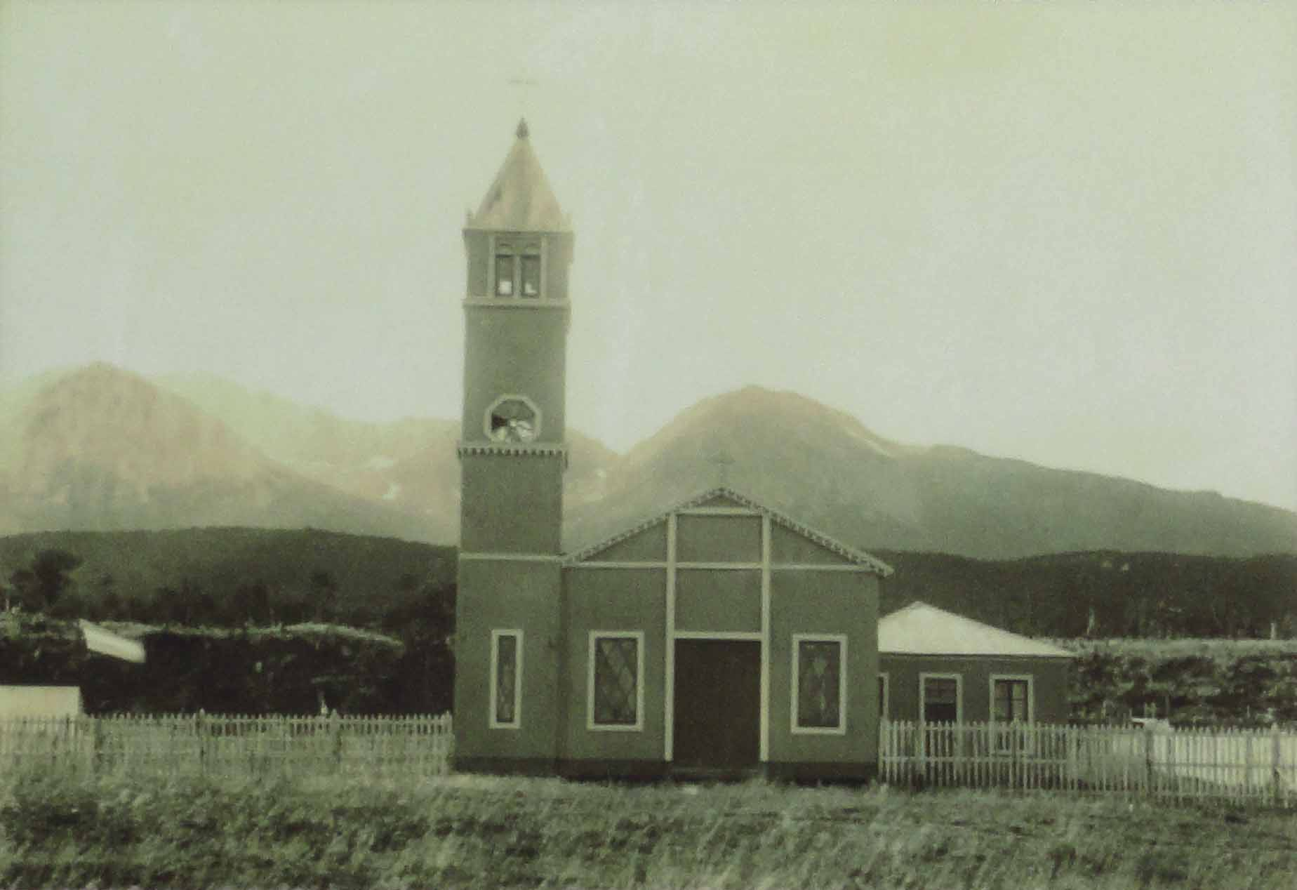 A igreja paroquial salesiana, a primeira igreja católica de Ushuaia